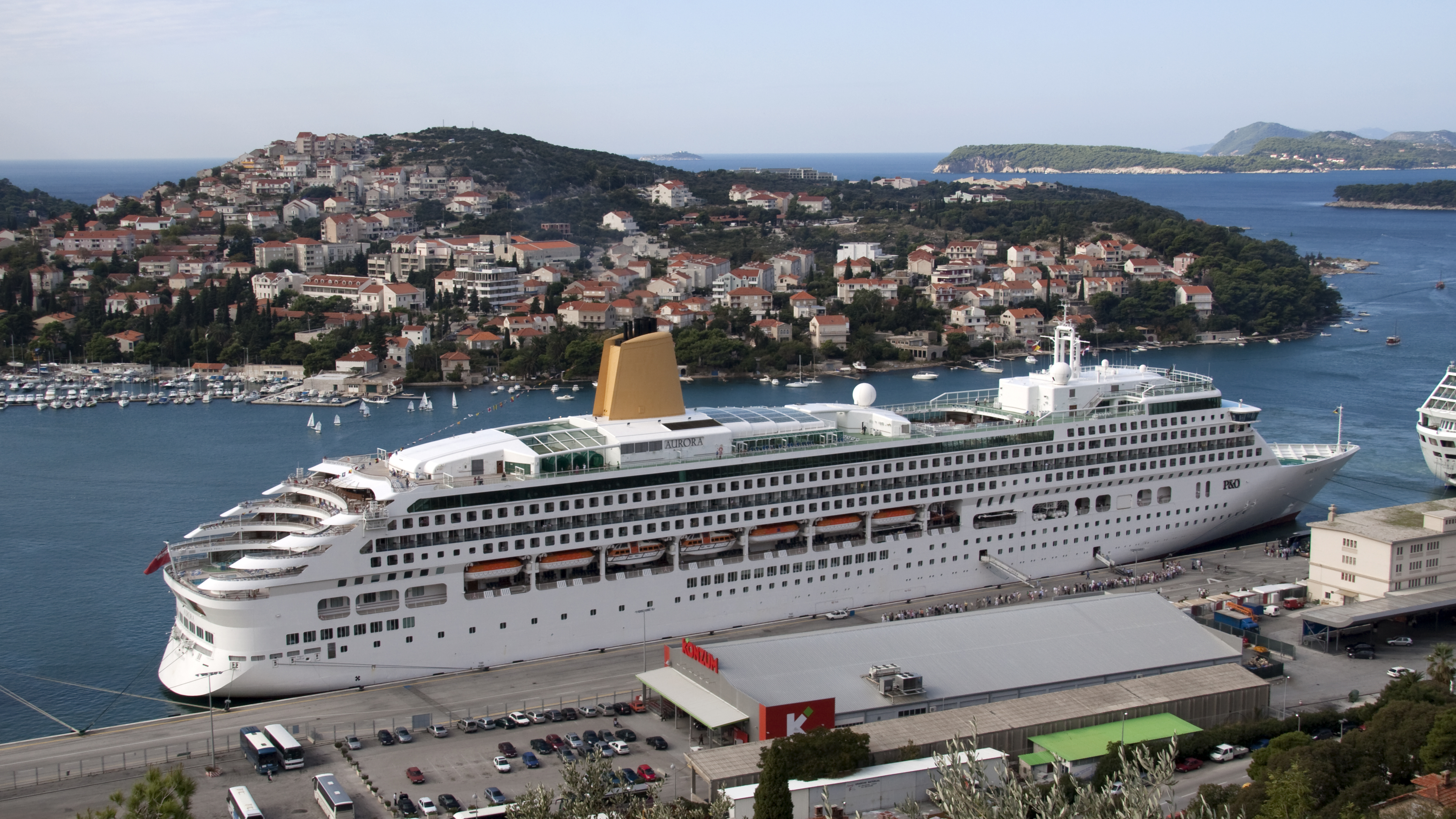 MV Aurora alongside at Dubrovnik